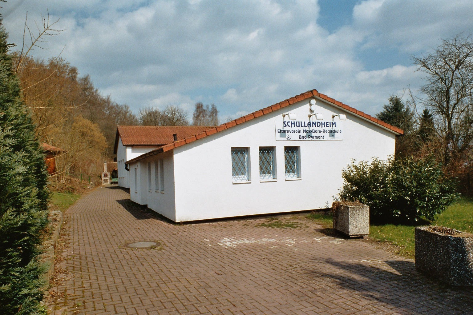 Schullandheim in Reinhardshagen - Veckerhagen Quelle: selbst fotografiert Fotograf/Zeichner: presse03 Datum: 08.04.2006